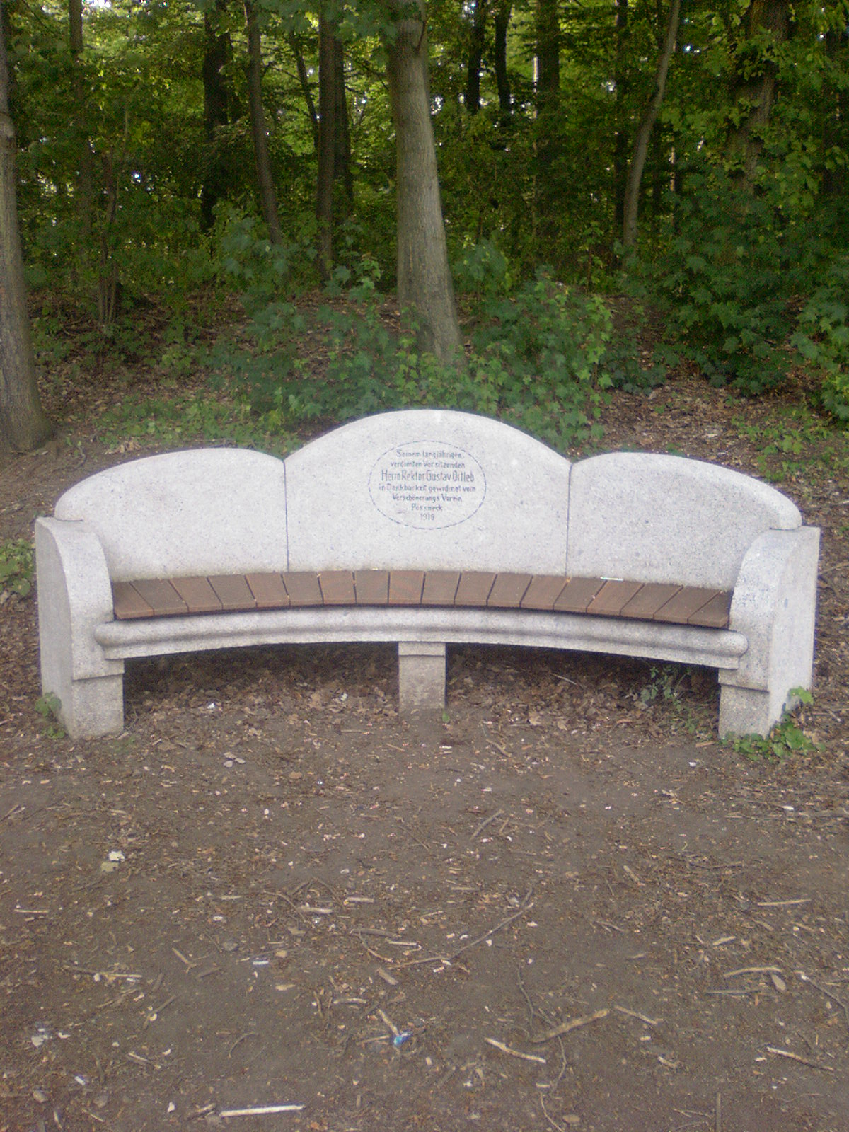 Bank im Waldstück südlich von Pößneck zum Gedenken an Gustav Ortleb 1919